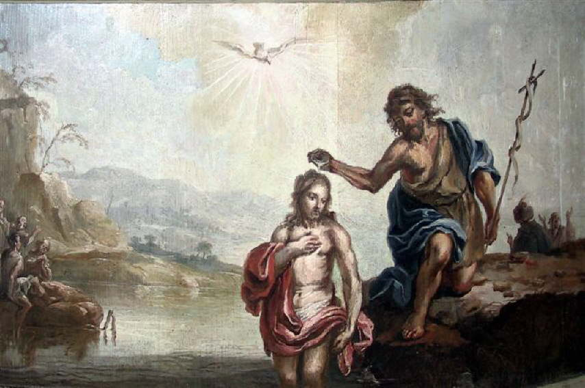 Emporengemälde in der Bergkirche Osthofen